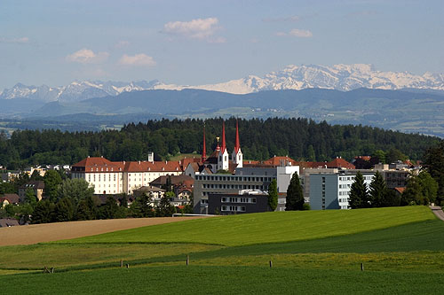 Kloster und Spital in Muri (Nr. 03.1-4458)